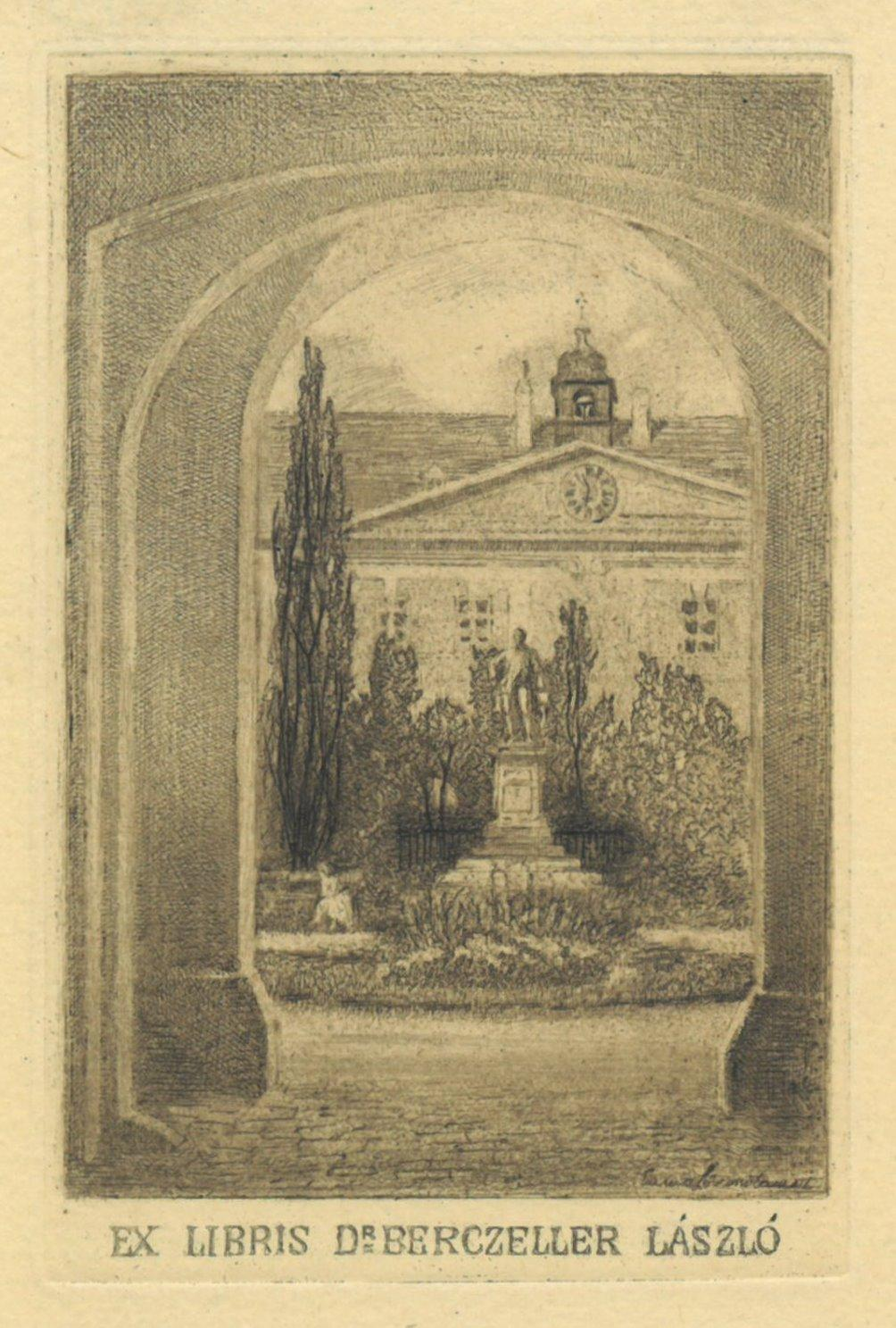 Ex libris Laszlo Berczeller. Radierung, i. d. Platte sign. "Emma Löwenstamm", um 1910, 10 x 7 cm. Der Chemiker, Lebensmittelphysiologe und Professor für Biochemie in Budapest L. Berczeller erfand die Herstellung von Sojamehl